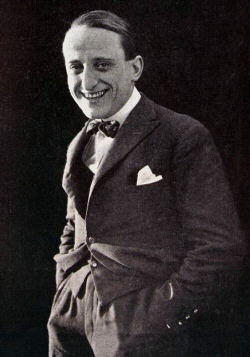 photo from journal FERT Produzione Cinematografica,, Primo bollettino, 1920.